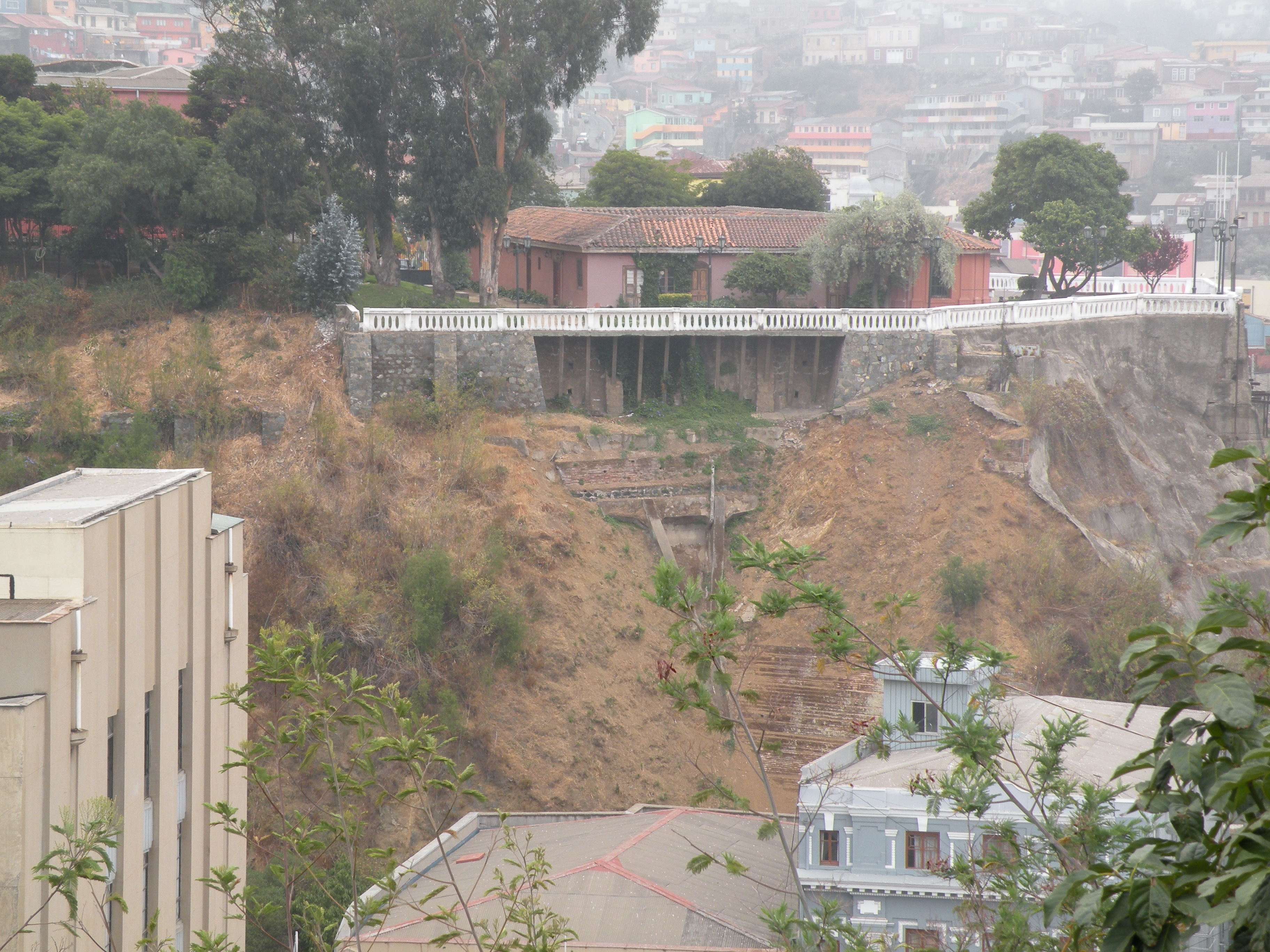 Castillo San José, Valparaíso, Chile.